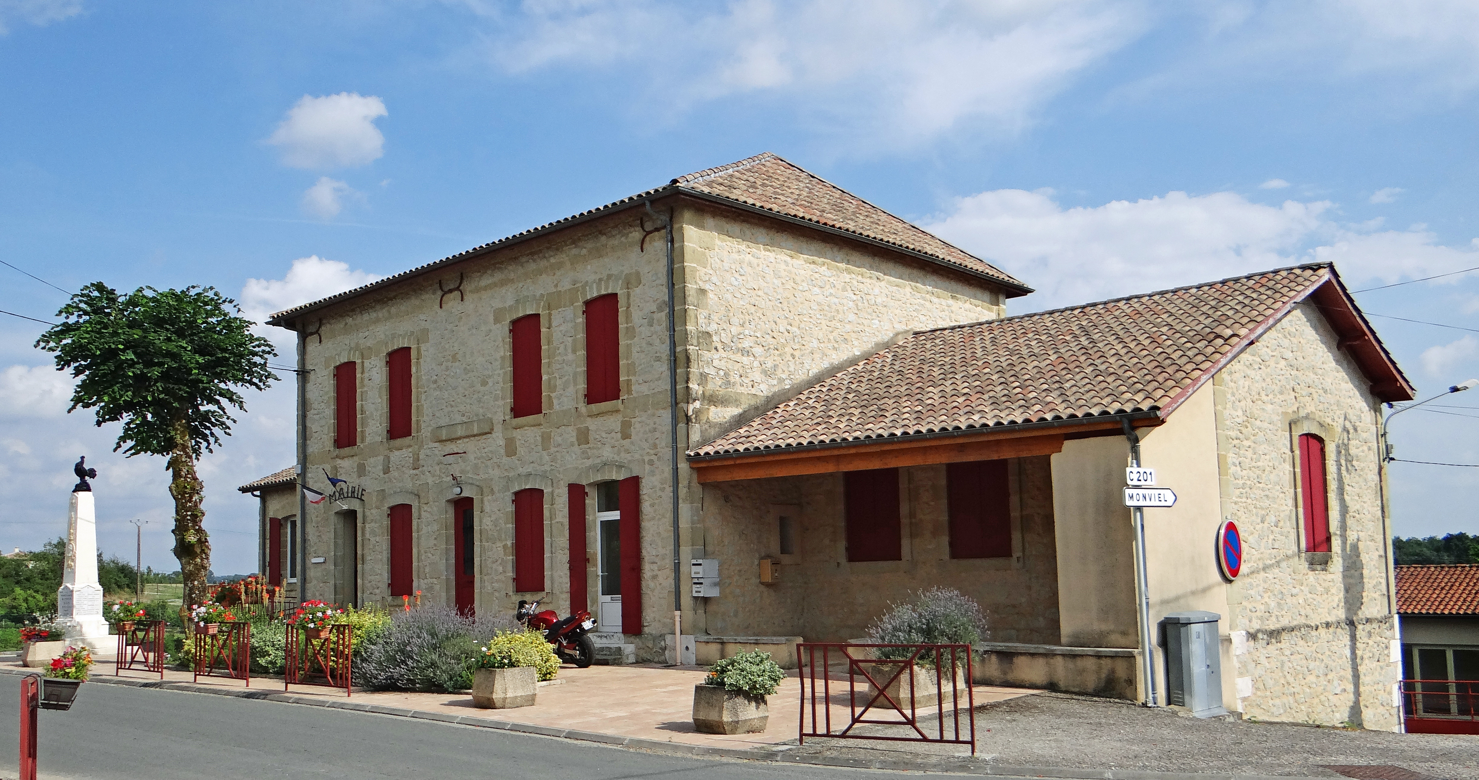 Ségalas - Mairie